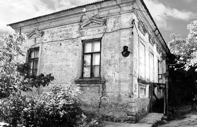 Дом Коссич в Феодосии (ныне ул. Челнокова, 59)